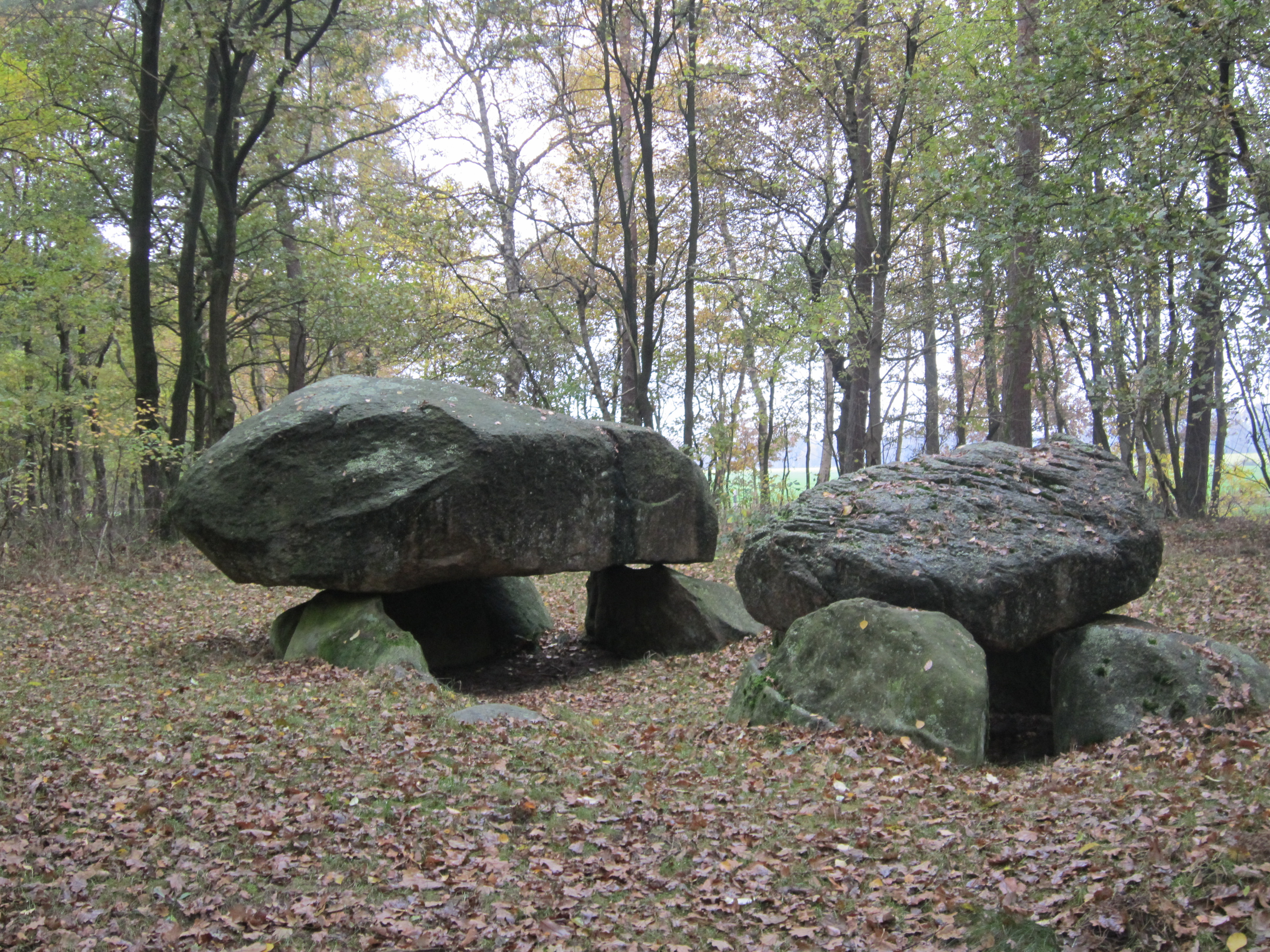 Grosssteingrab Apeldorn (Stadt Meppen)